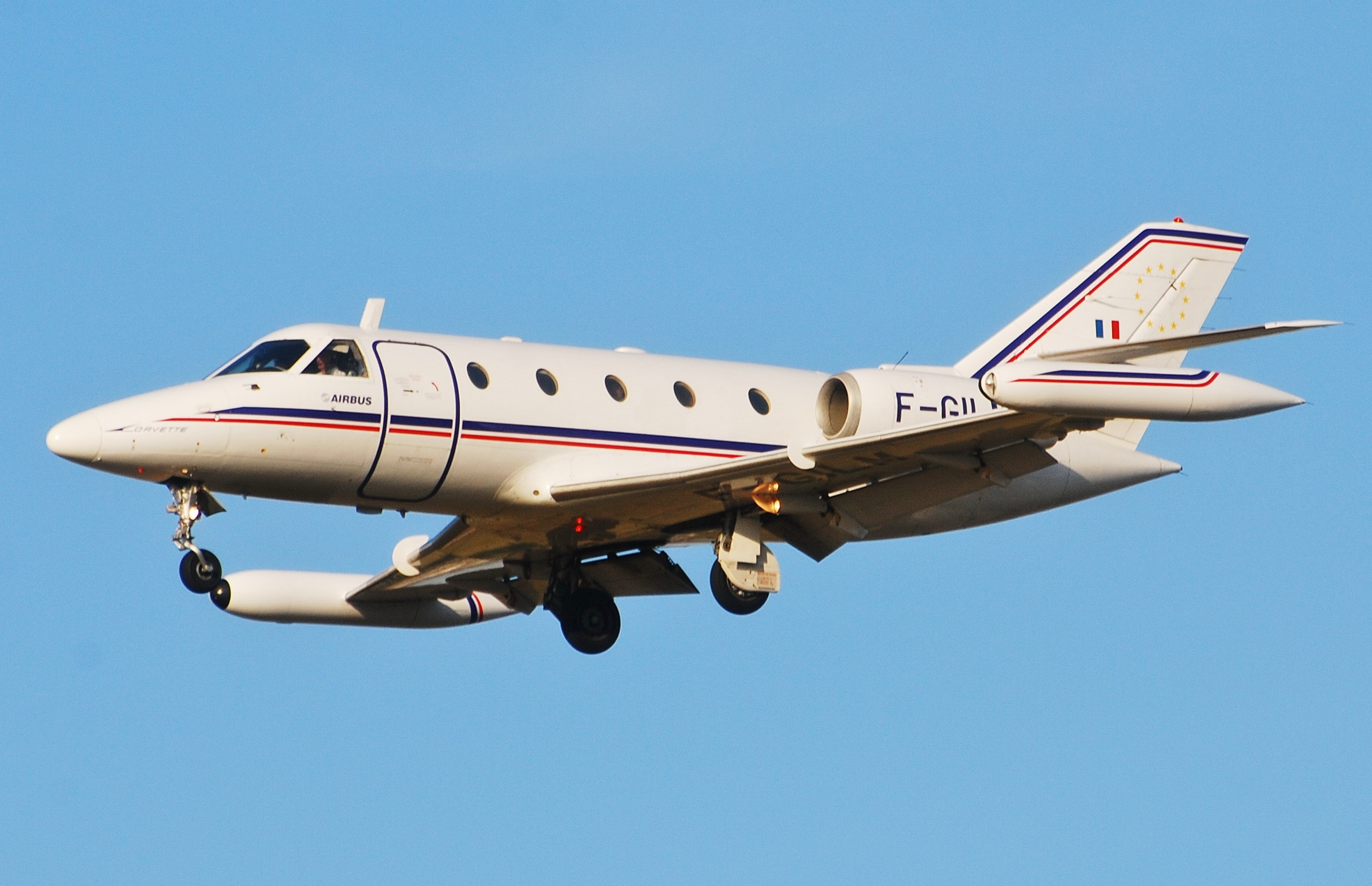 Photo prise à l'aéroport de Toulouse-Blagnac (LFBO) en France. Picture take at Toulouse-Blagnac Airport (LFBO) in France.